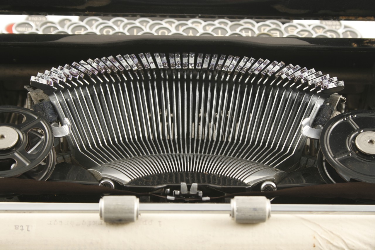 Macchina semi-standard con telaio in metallo verniciato di nero. La tastiera italiana QZERTY presenta 43 tasti a sfondo nero e bordi in plastica, disposti su quattro righe; la barra spaziatrice è in bachelite nera. Gli 86 caratteri sono montati su martelletti riposanti nella cesta delle leve semicircolare. Ai lati della cesta si trovano due bobine di nastro, coperte da una calotta protettrice apribile. Nella parte anteriore della macchina è applicato un frontalino incorniciato, costituito da un foglio di carta monocromo grigio coperto da un foglio trasparente di plastica. Il carrello, ospitante il rullo rivestito di gomma, è incassato nella carrozzeria e presenta la leva per il movimento di ritorno sul lato sinistro. La macchina è accessoriata con una valigetta di pelle grigia, con due chiavette. Modalità d'uso L'abbassamento di un tasto aziona il cinematico e il martelletto portacaratteri scatta, colpendo il punto di battitura da posizione frontale. Il tasto delle maiuscole comanda il sollevamento del carrello. L'inchiostrazione avviene mediante nastro inchiostrato inserito in un sollevanastro. Attraverso un sistema di scappamento, il carrello portacarta compie uno spostamento ad ogni battuta di tasto, permettendo la composizione di una riga. La scrittura è pienamente visibile Notizie storico-critiche Con la realizzazione della Studio 42 nel 1935, l'Olivetti entrò nel settore di mercato delle semi-standard. Combinazione tra le macchine professionali standard e le portatili, le semi-standard avevano dimensioni ridotte ed erano facilmente trasportabili; offrivano inoltre prestazioni semplificate, adatte a lavori d'ufficio sussidiari o ad esigenze di particolari categorie di professionisti e privati La datazione di questo esemplare è stata determinata basandosi sul numero di serie.